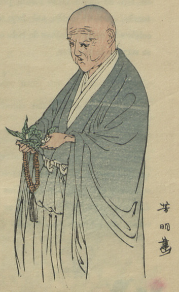 Ilustração na obra O culto do chá.